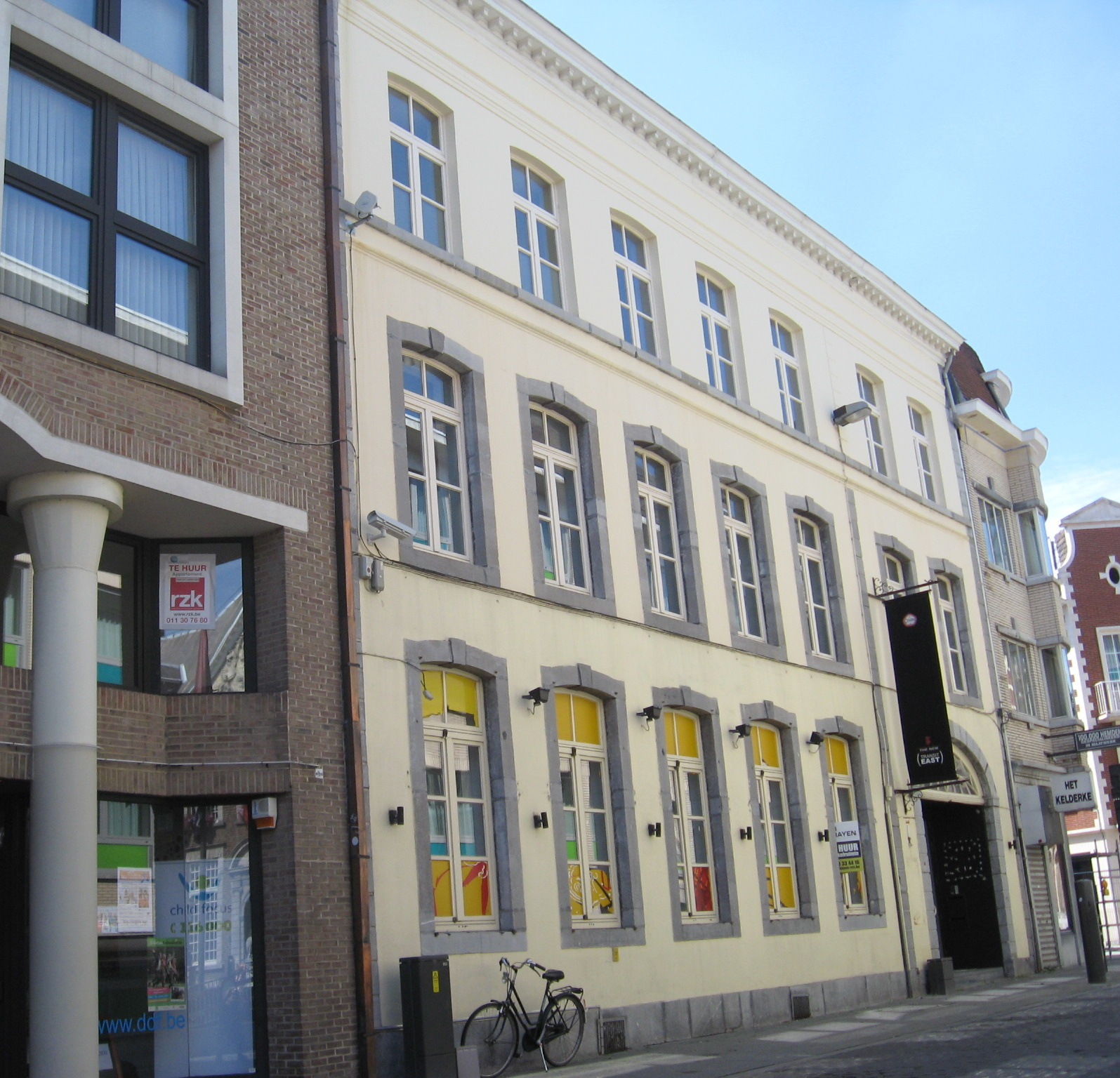 Voormalig lyceum in classicistische stijl in Hasselt